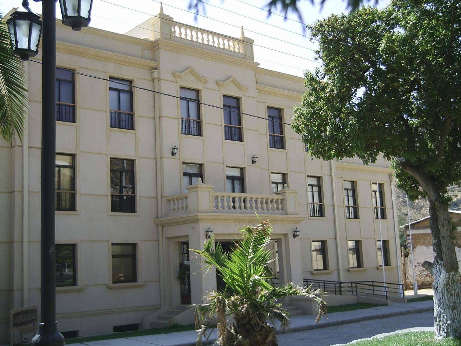 Ilustre municipalidad de Canela